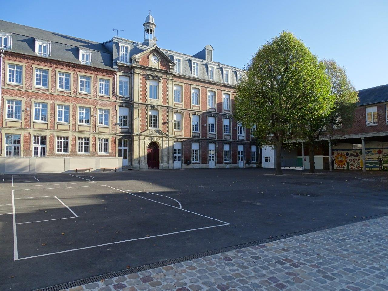 Cour et façade du collège